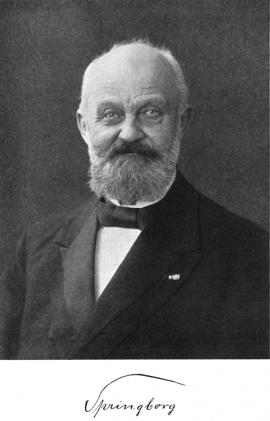 Bygnings- og brandinspektør Eduard Ludvig Frederik Springborg, Kilde: Aarhus Borgere 1915-1920, hæfte II. Fotograf: Michele Alessio Caprani